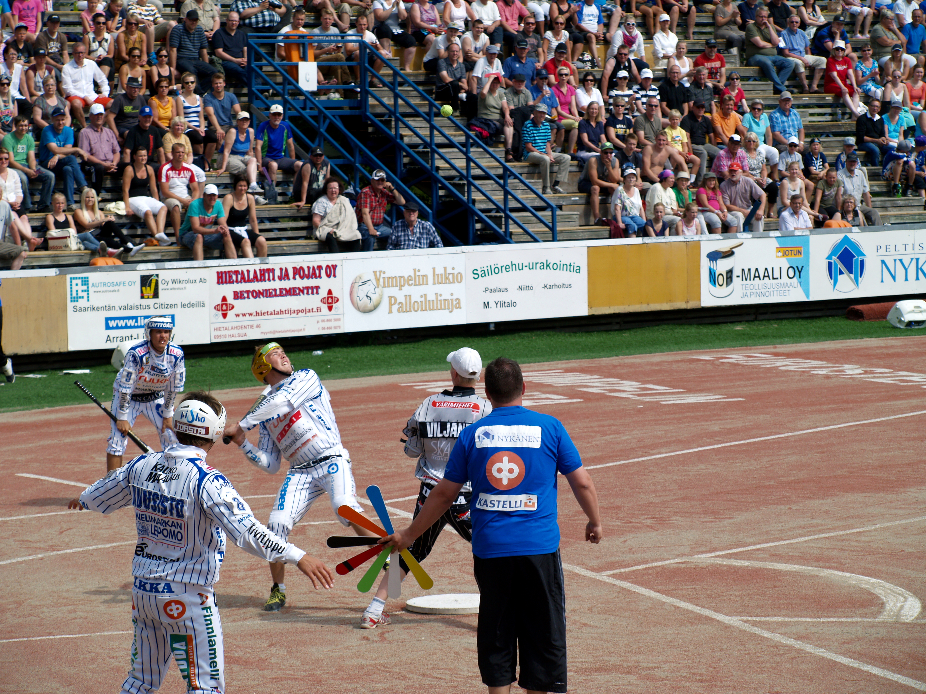 Vimpelin Veto - JymyJussit pesäpallo-ottelu 13.7.2014.